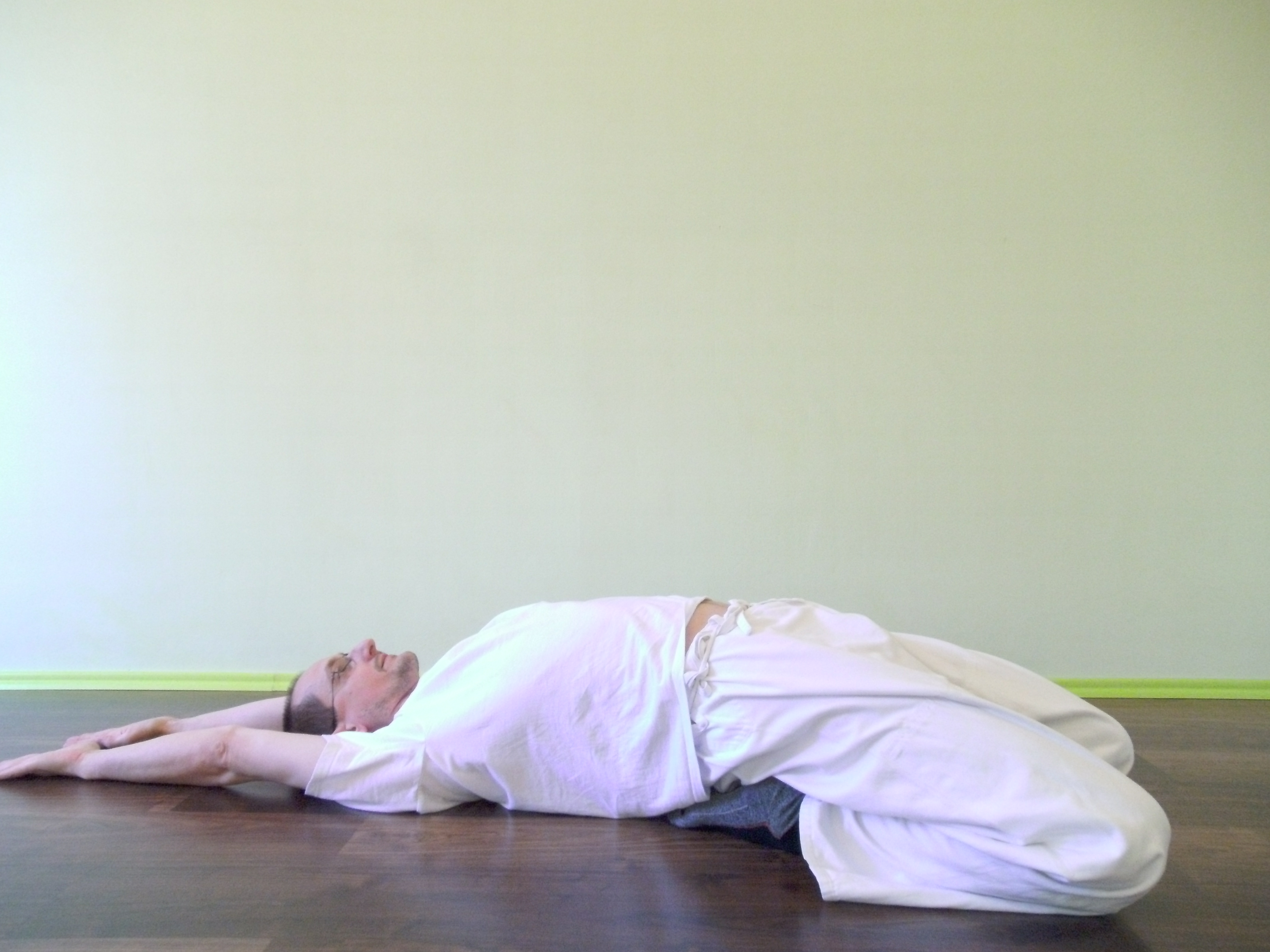 Makko Ho Übung für Magen- und Milz-Meridian